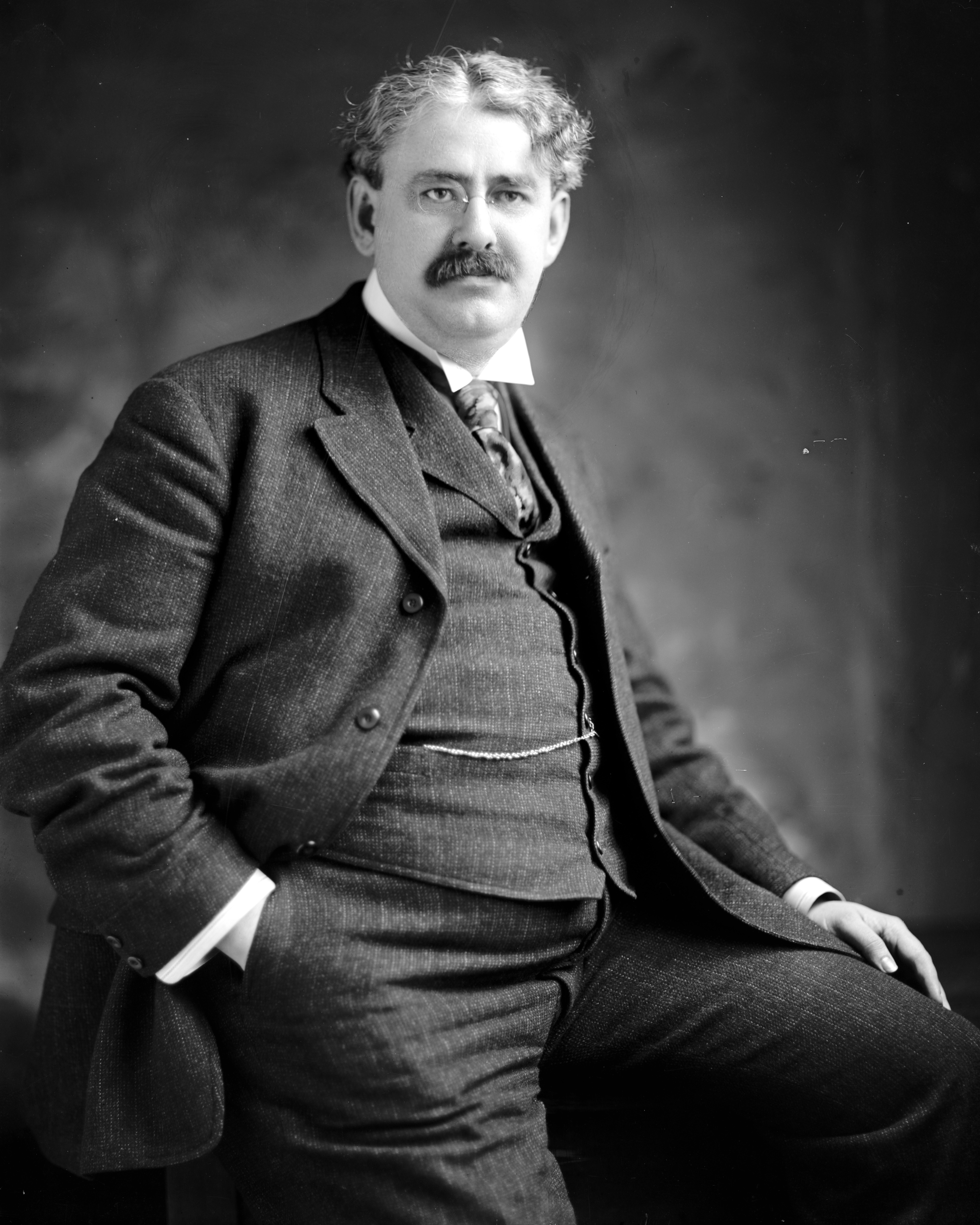 MULKEY SEN. F.W.